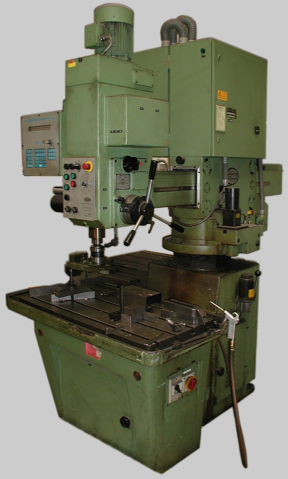 Wiertarka promieniowa drobna przeróbka z de wiki. Grafika udostępniona na licencji GFDL